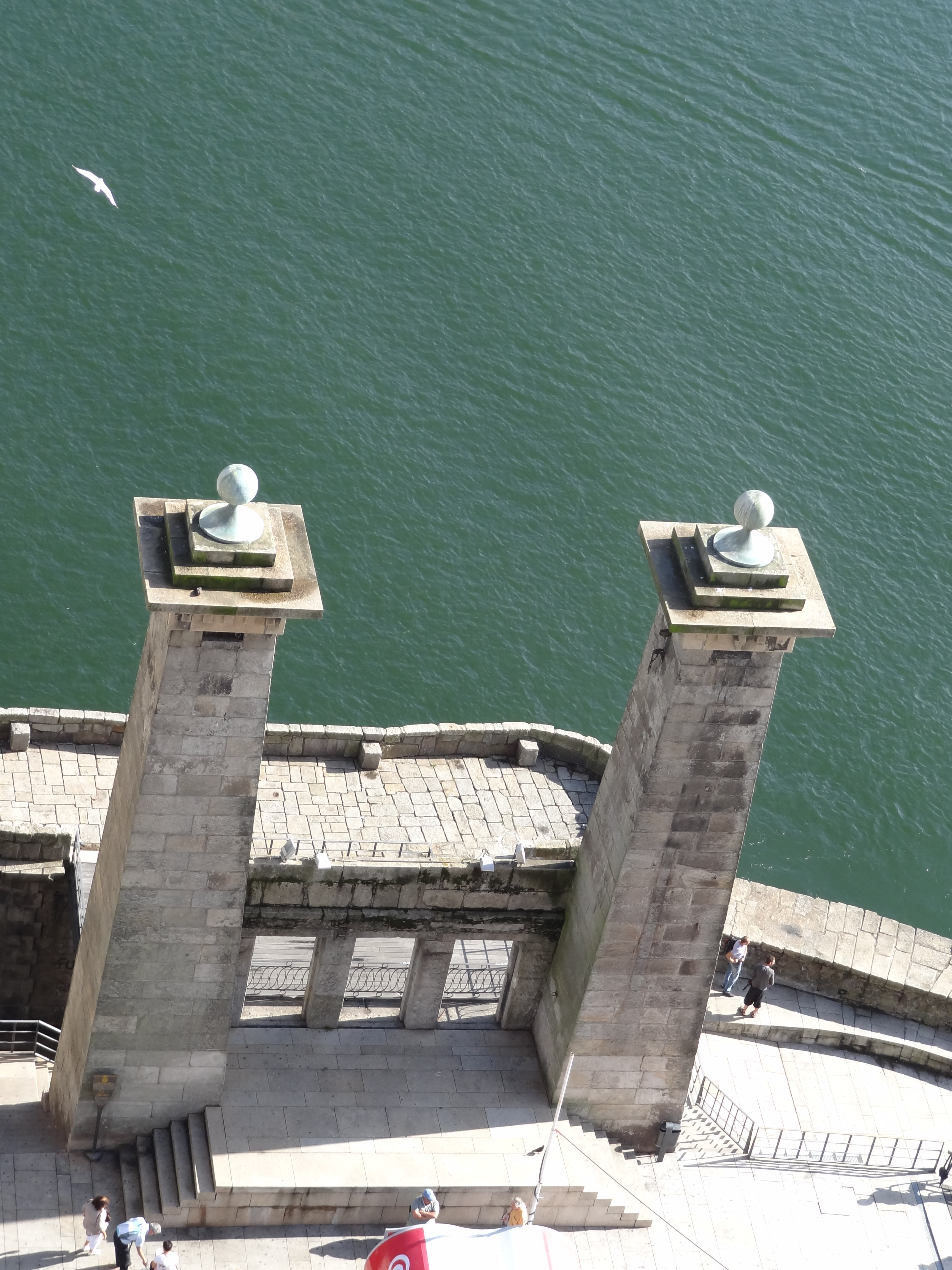 pillars of the suspension bridge in Oporto This file was uploaded for Wiki Loves Monuments in Portugal with the unique identifier 74817.